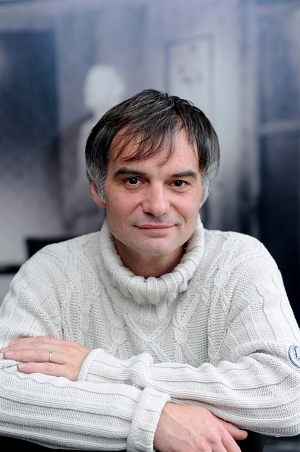 Ivan Trojan (nar. 1964) je český herec.